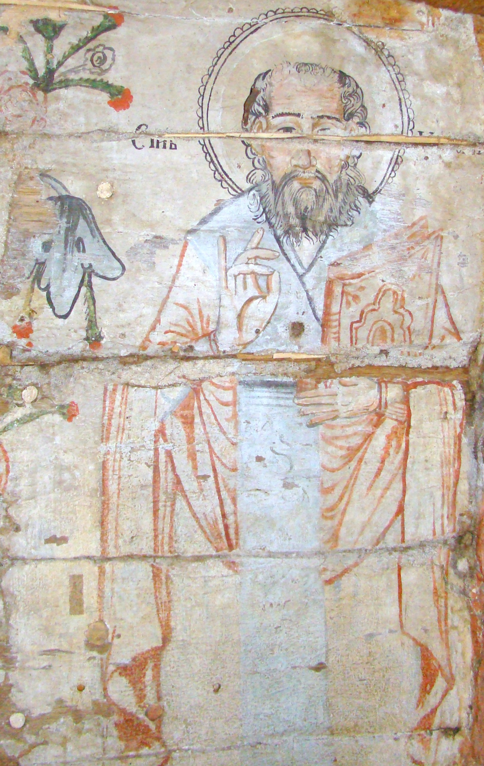 Biserica de lemn din Racâș, județul Sălaj